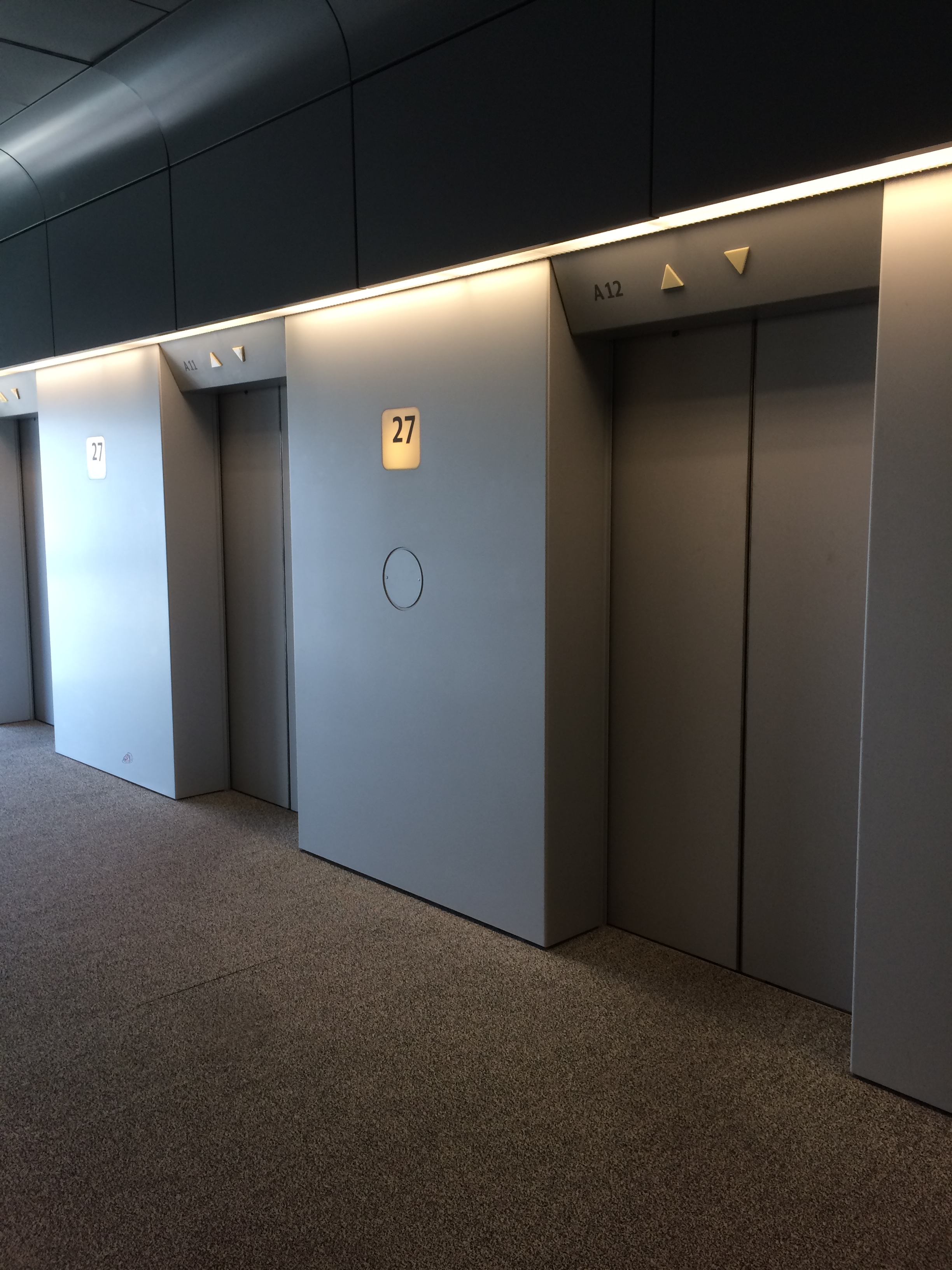 Aufzug Silberturm